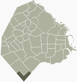 Barrio de Villa Riachuelo